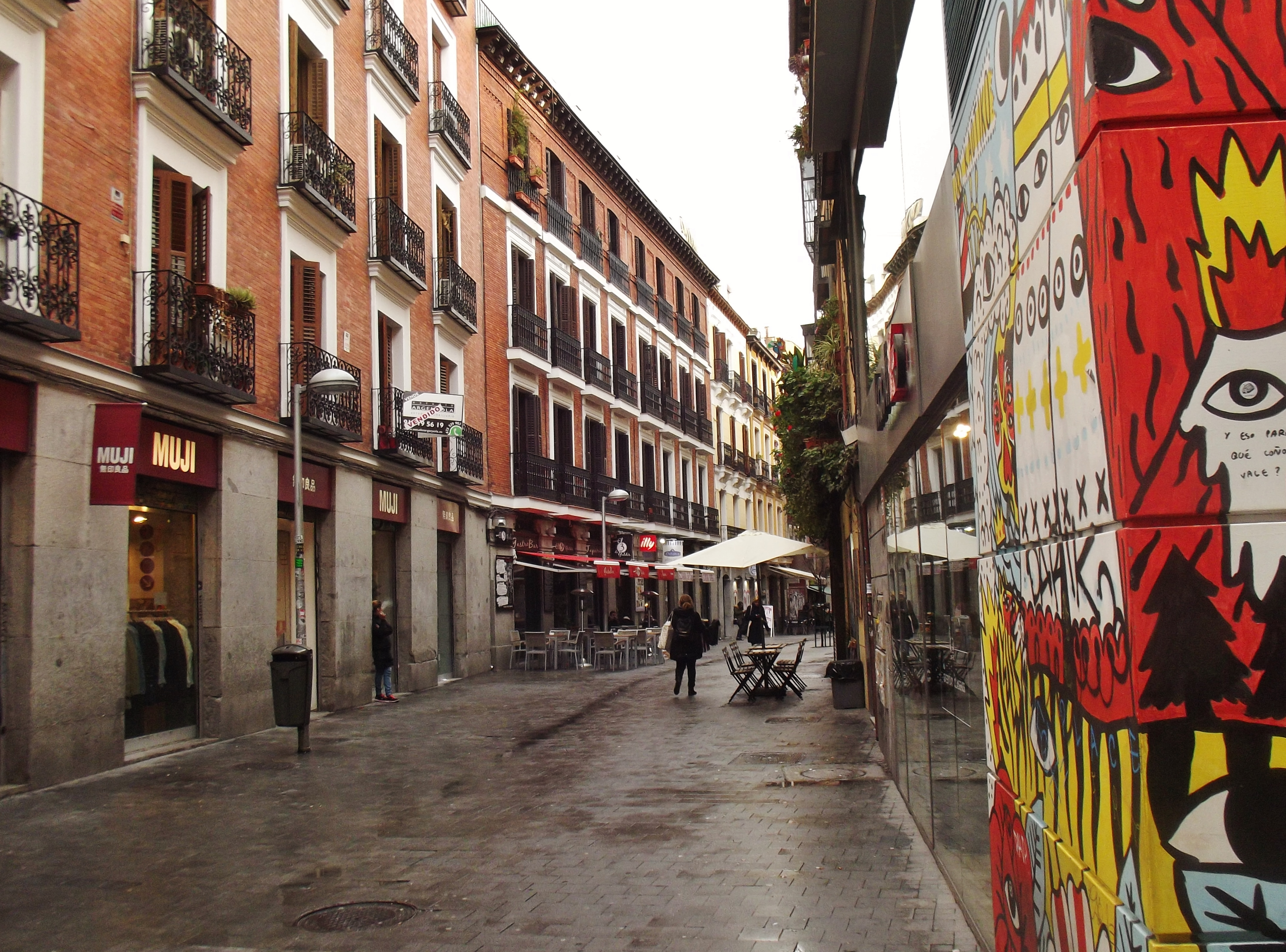 Calle de Pérez Galdós, Madrid